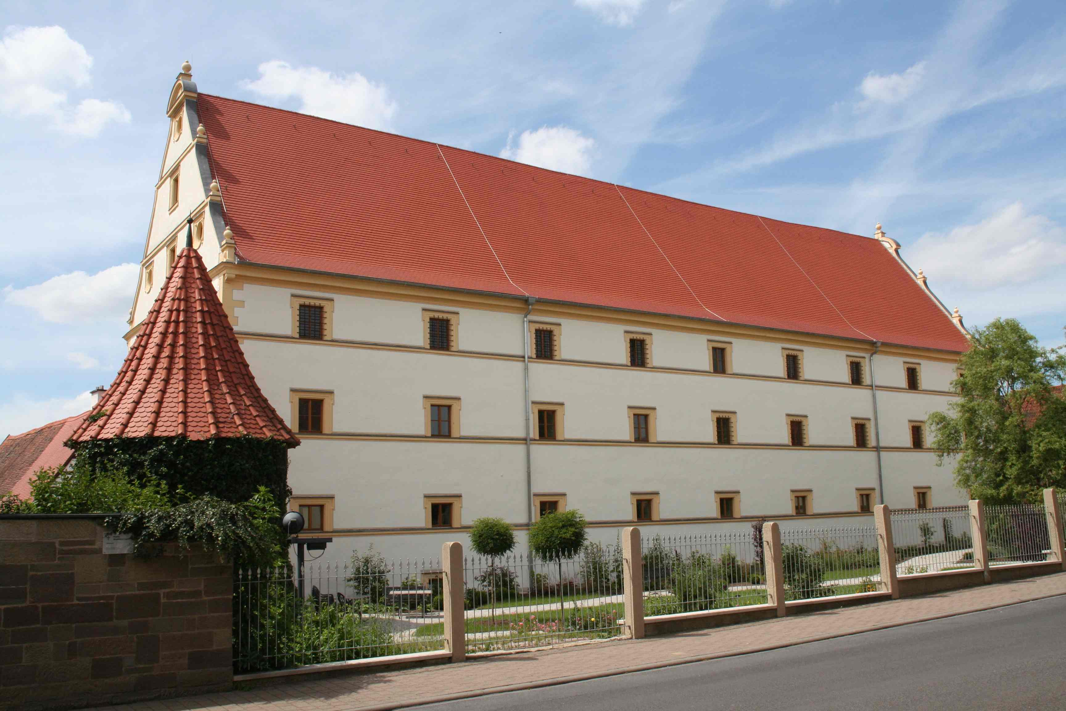 Stadtlauringen im Landkreis Schweinfurt in Bayern - Amtskellerei mit Schüttbau